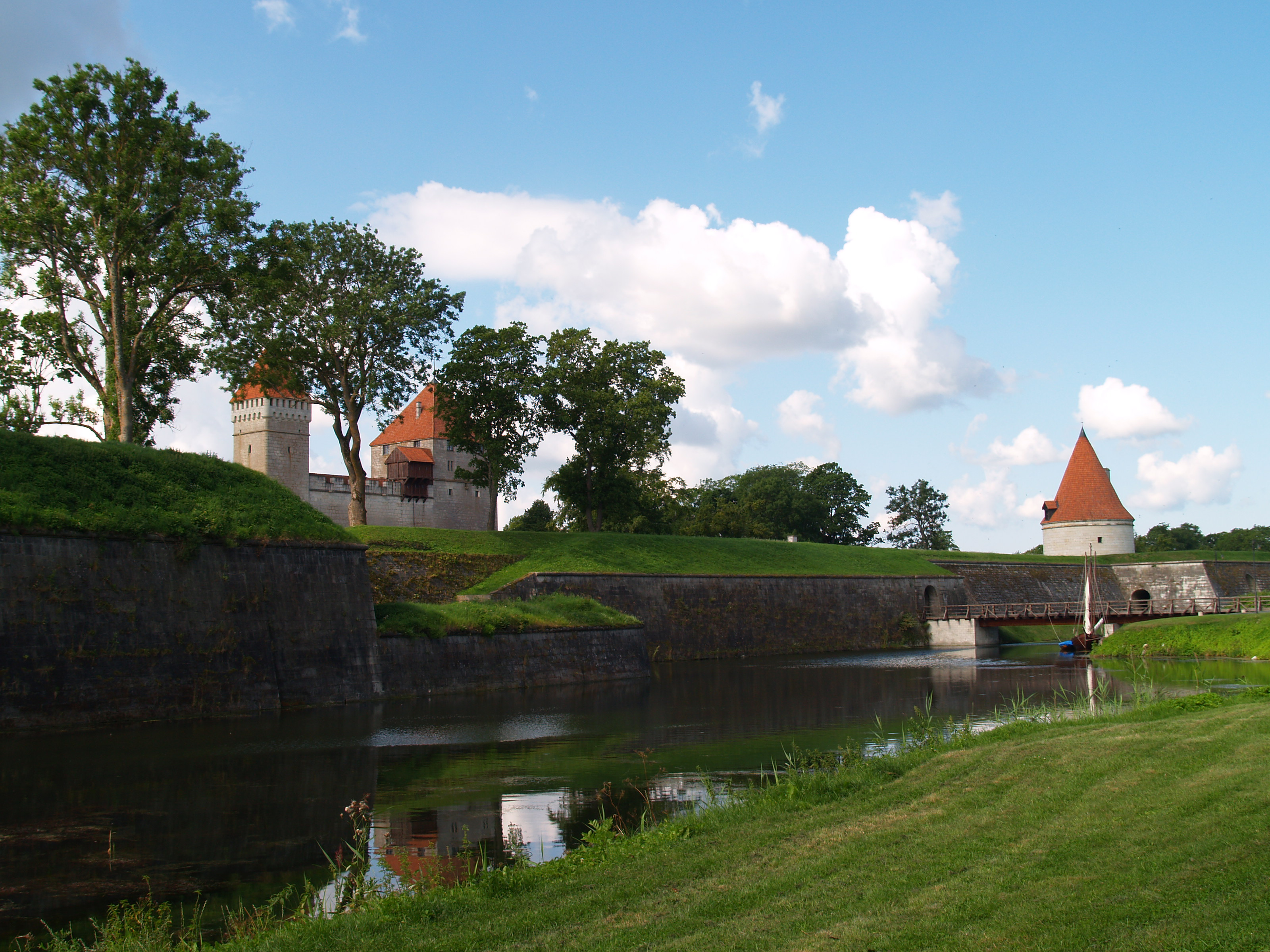 Kuressaare linnuse kindlusrajatised